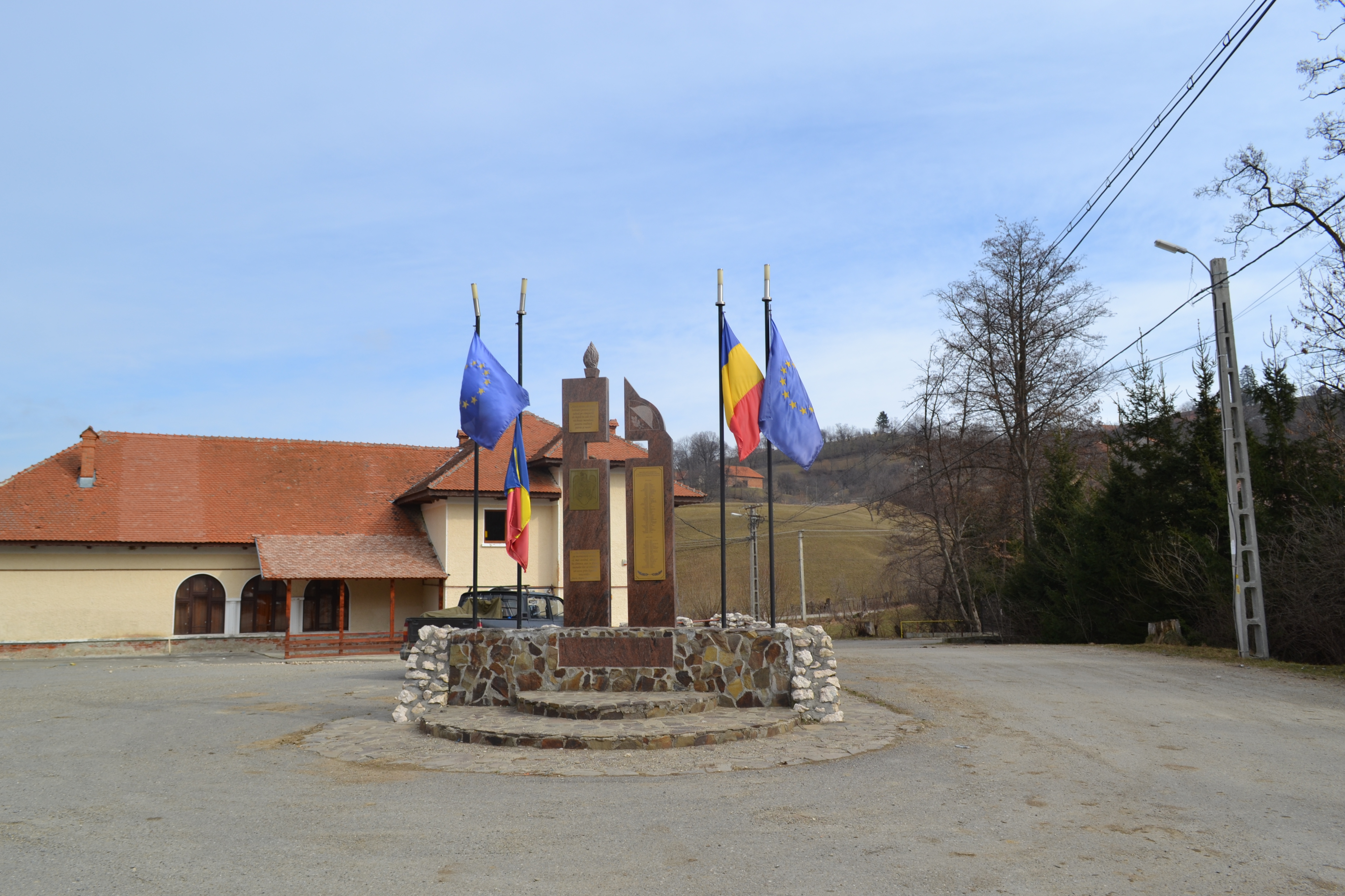 Monumentul eroilor Sohodol